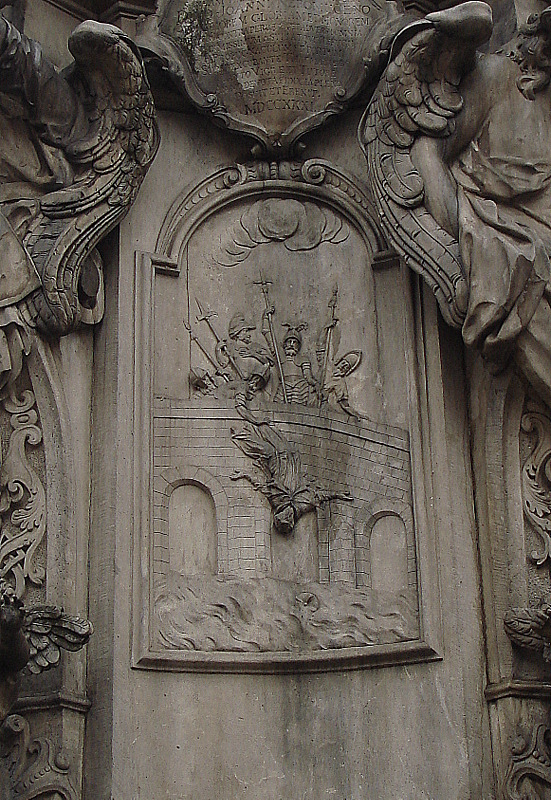 Wrocław, figura św. Jana Nepomucena, 1731